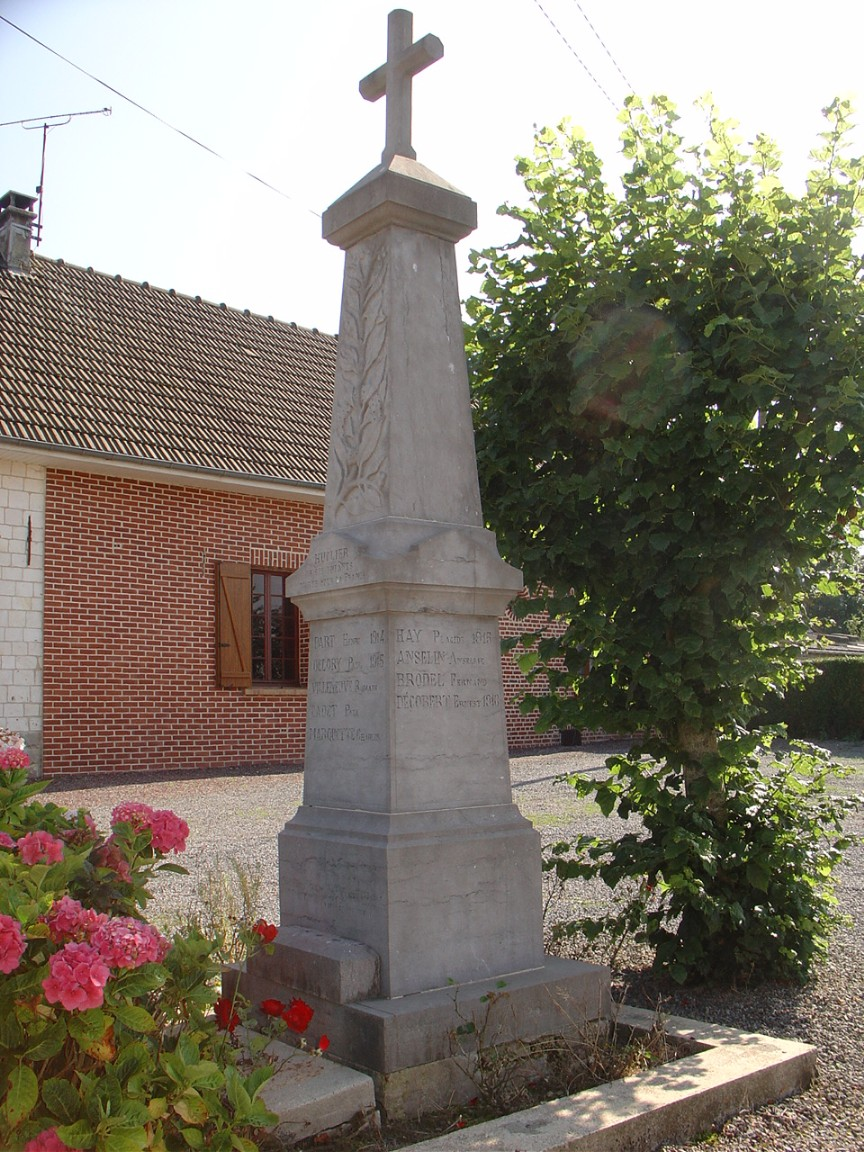 Monument aux Morts d'Huclier